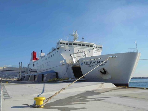 シルバークイーン (3代) 2018年7月27日 岩手県宮古フェリーターミナル